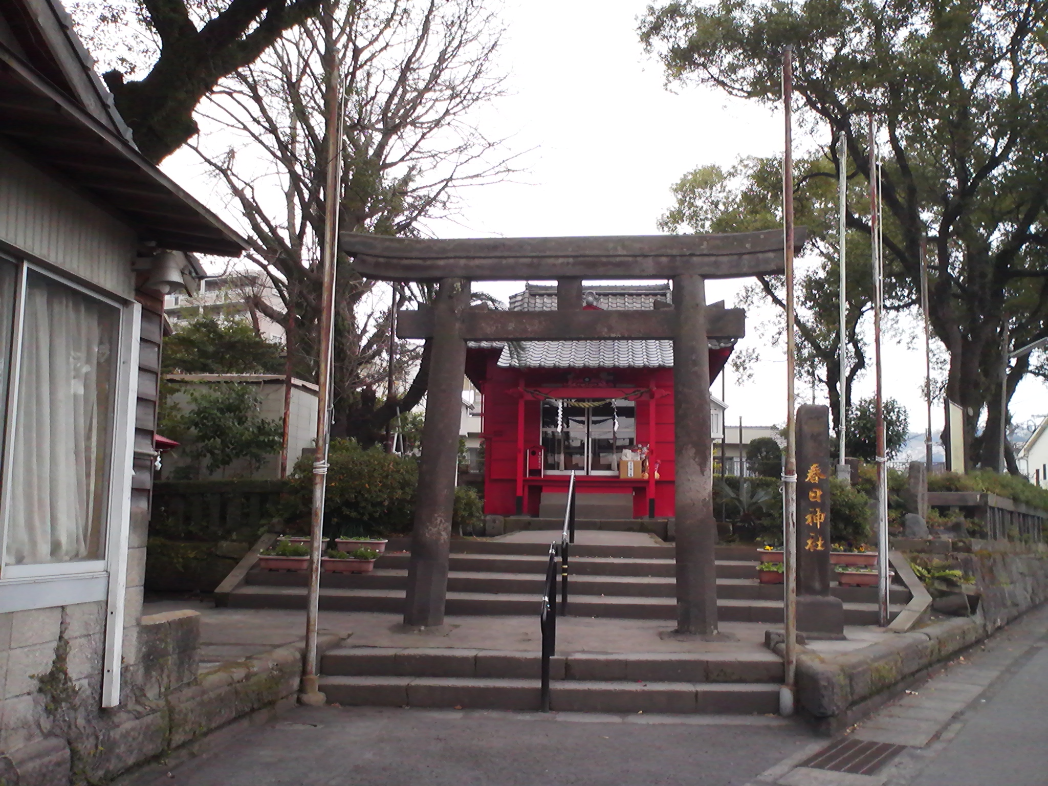 鹿児島県鹿児島市にある春日神社の外観。